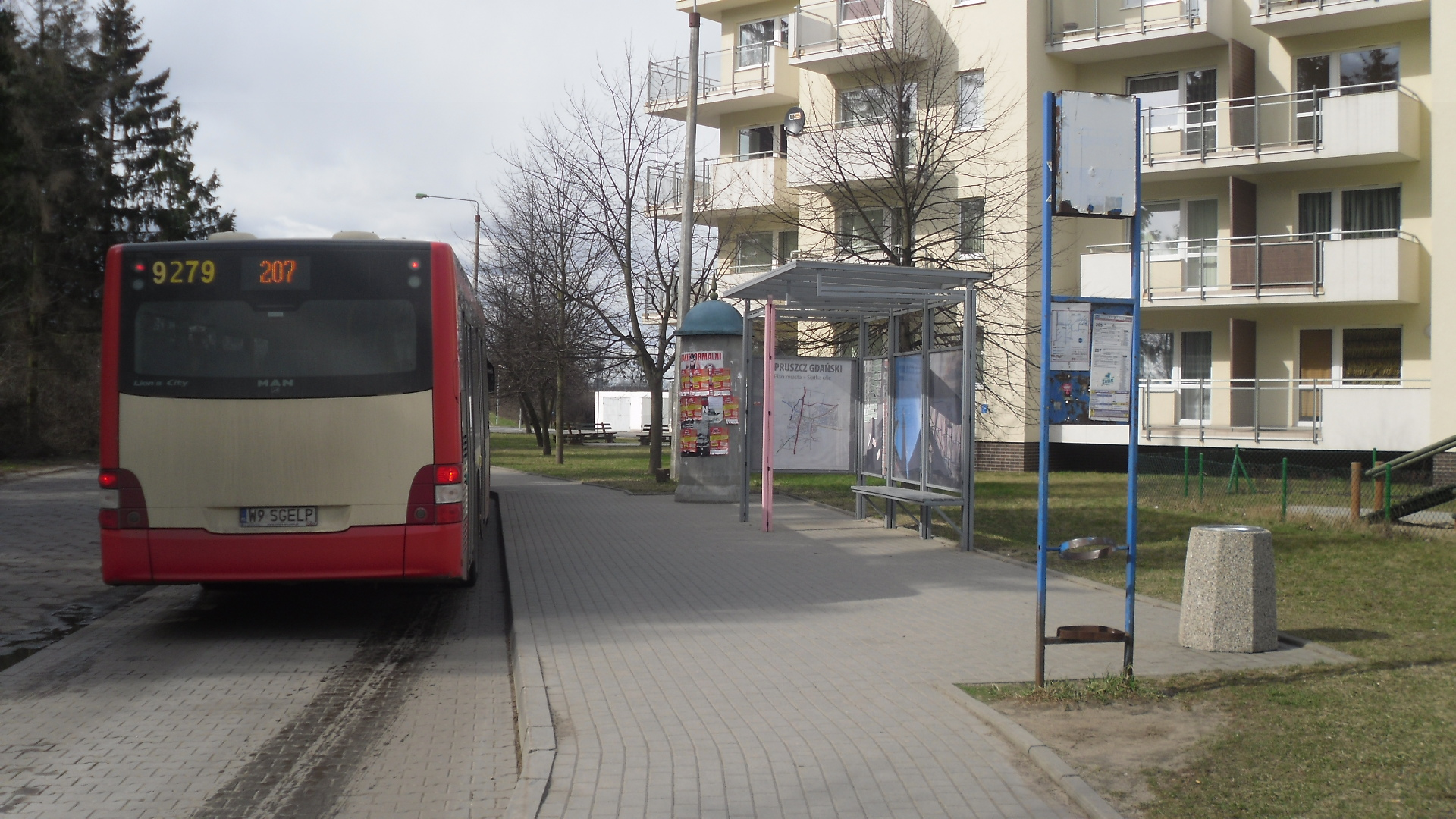 Pętla Komarowo, Pruszcz Gdański. Gdański autobus 207 (#9279).